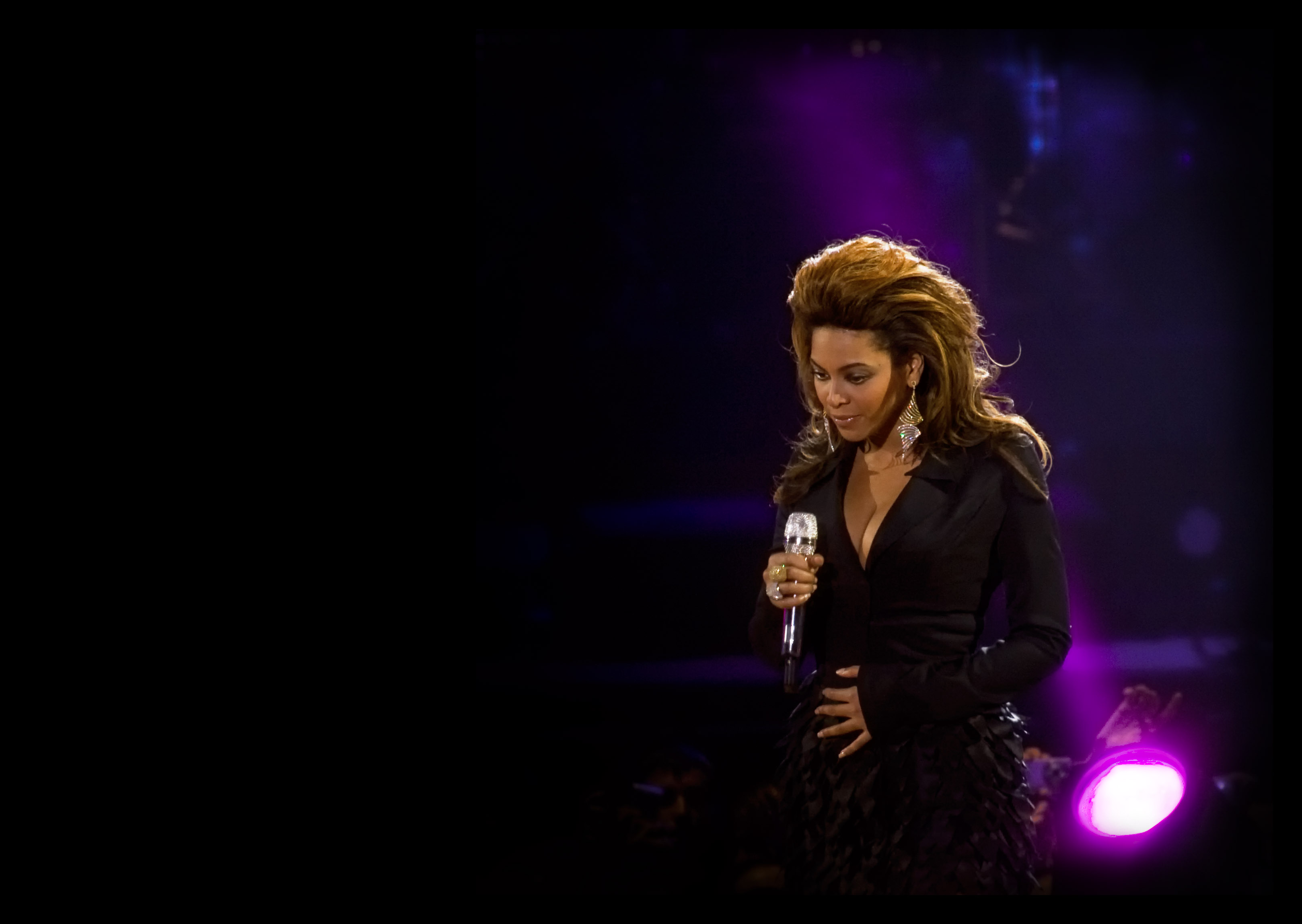 Beyoncé Premios 40 Principales Palacio de los Deportes 12.12.08 Madrid